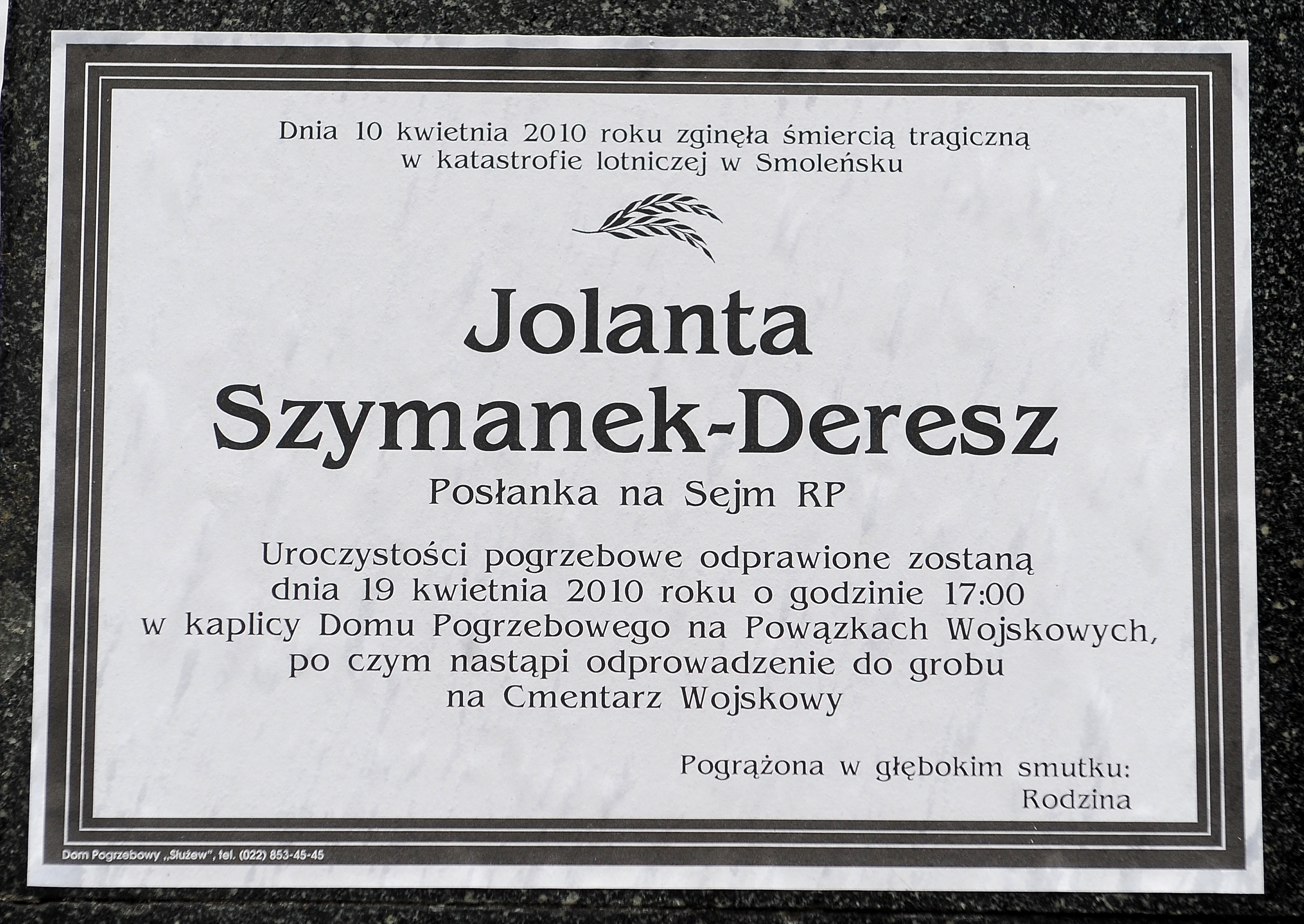 Nekrolog Jolanty Szymanek-Deresz